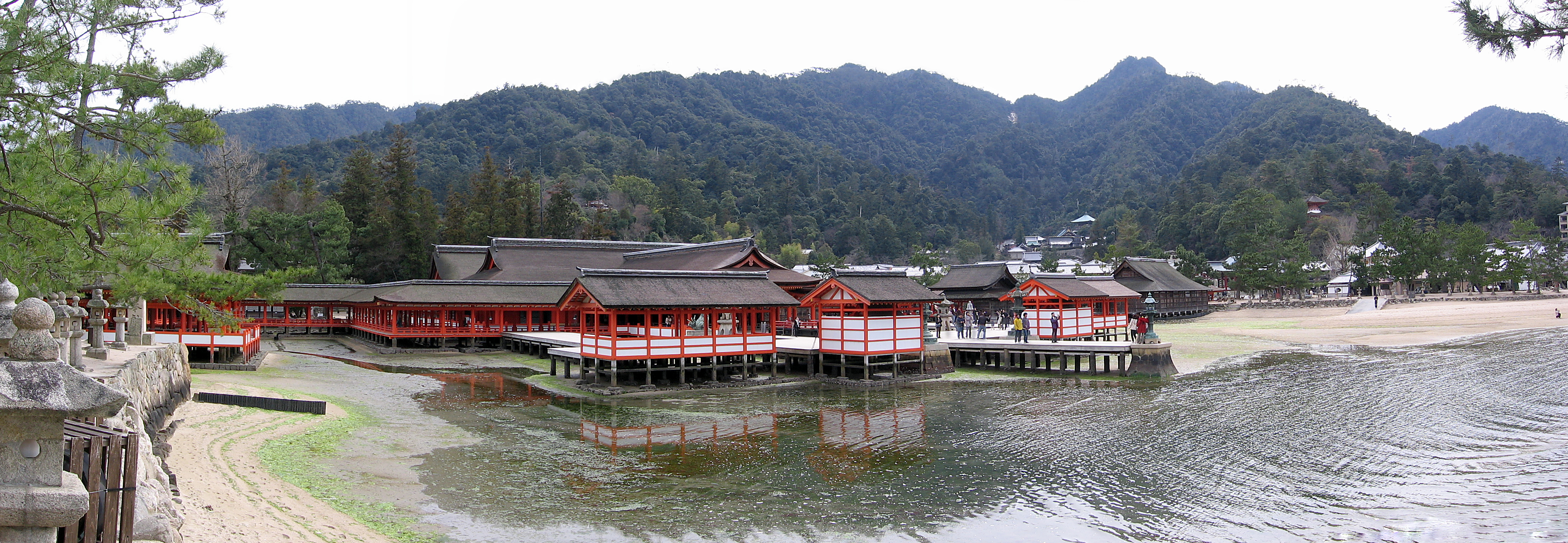 Itsukushima Shrine, Hiroshima, Japan.